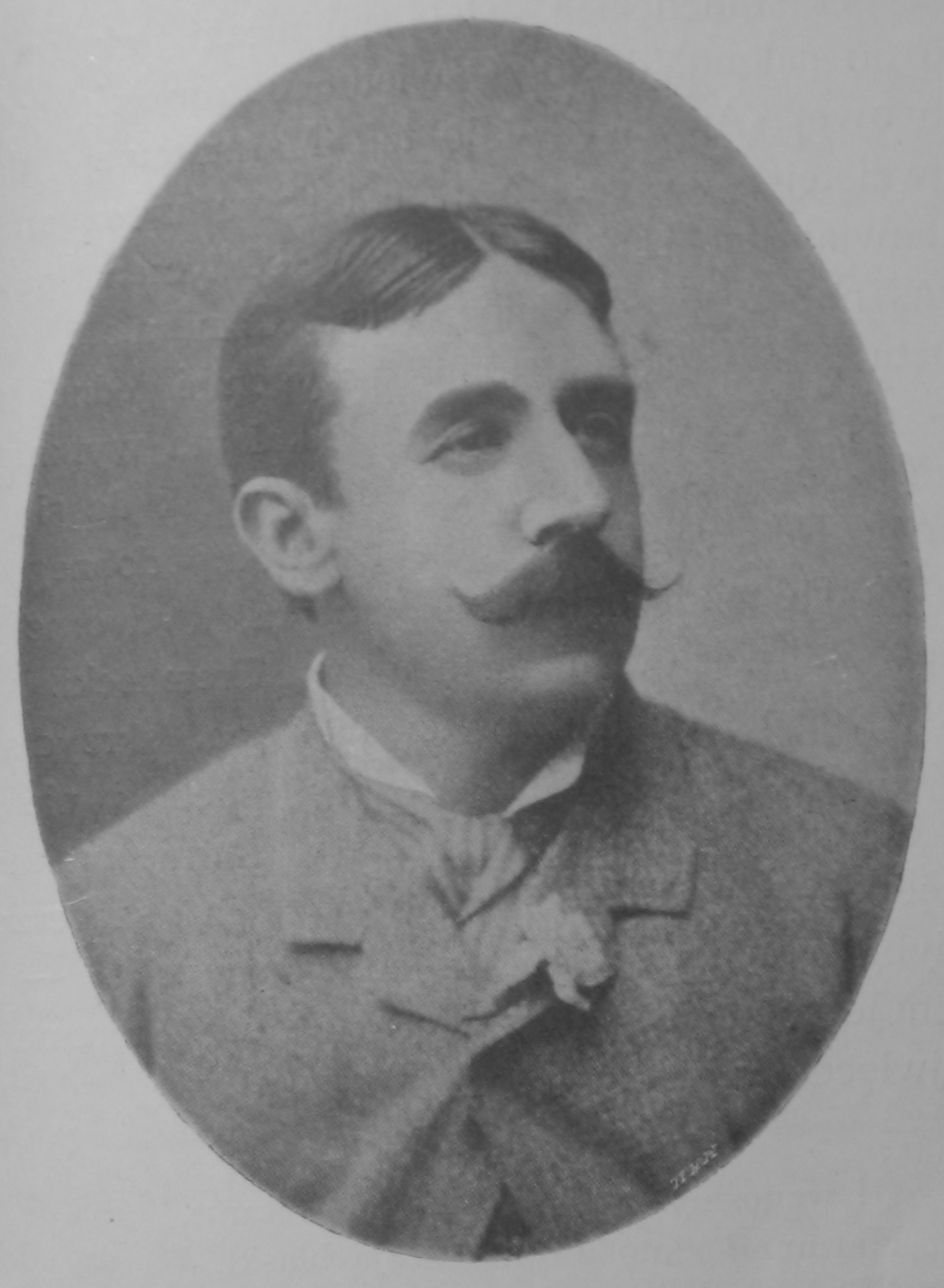 Wiktor Gomulicki (1848-1919), Polish writer